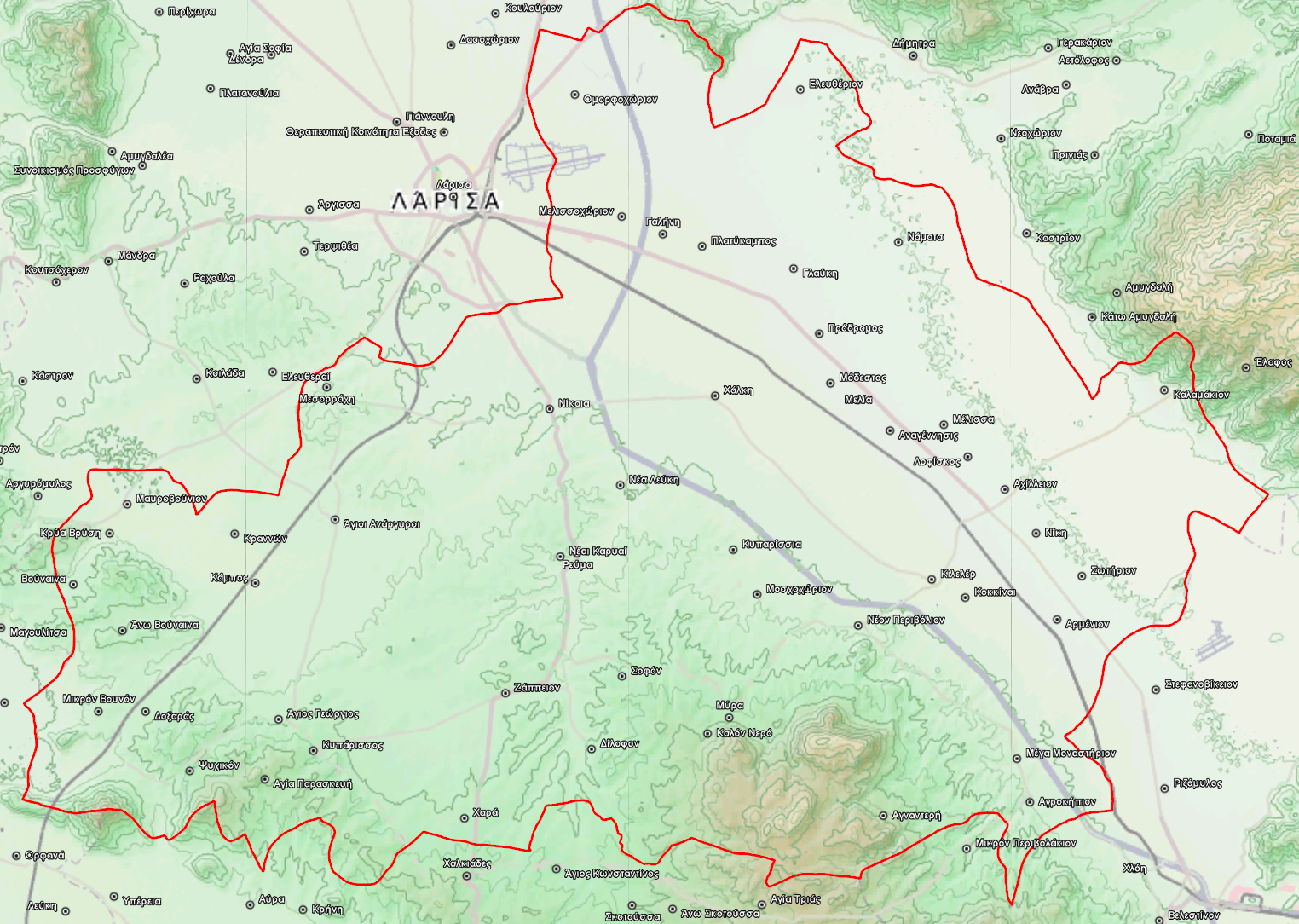 Τοπογραφικός χάρτης του Δήμου Κιλελέρ